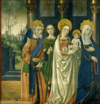 Presentació de Jesús al Temple- Mestre de la Seu d'Urgell-MNAC